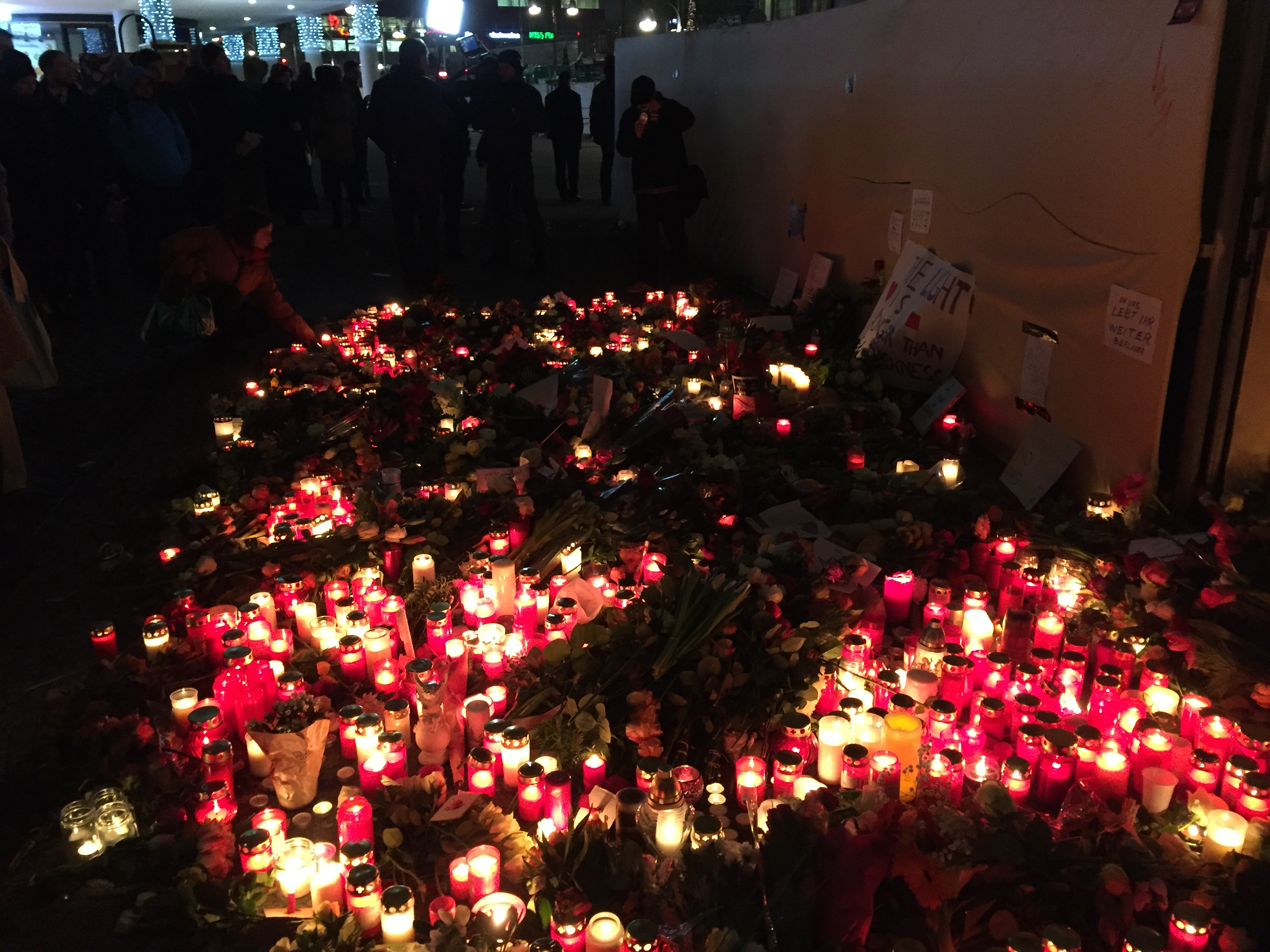 2016 Berlin Christmas market truck attack - hommage